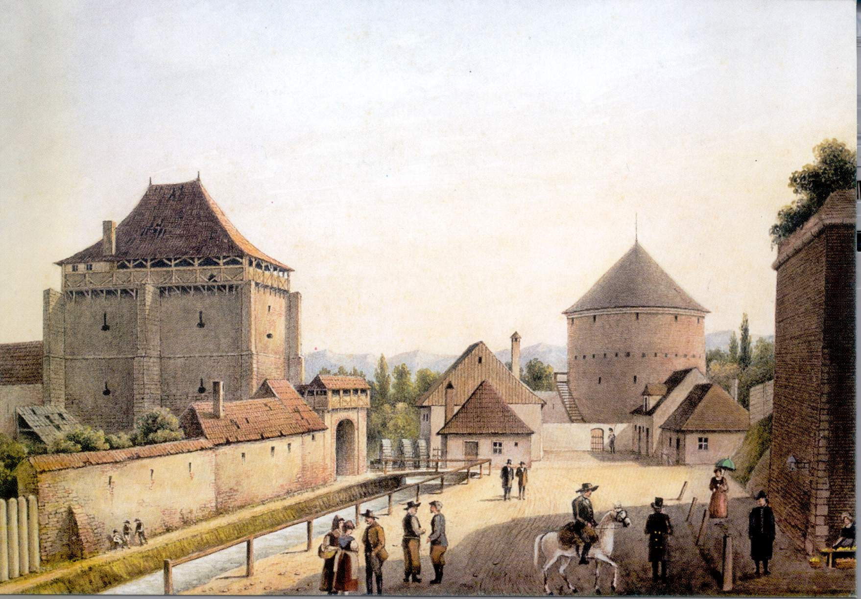 Poarta Burger-Ocnei